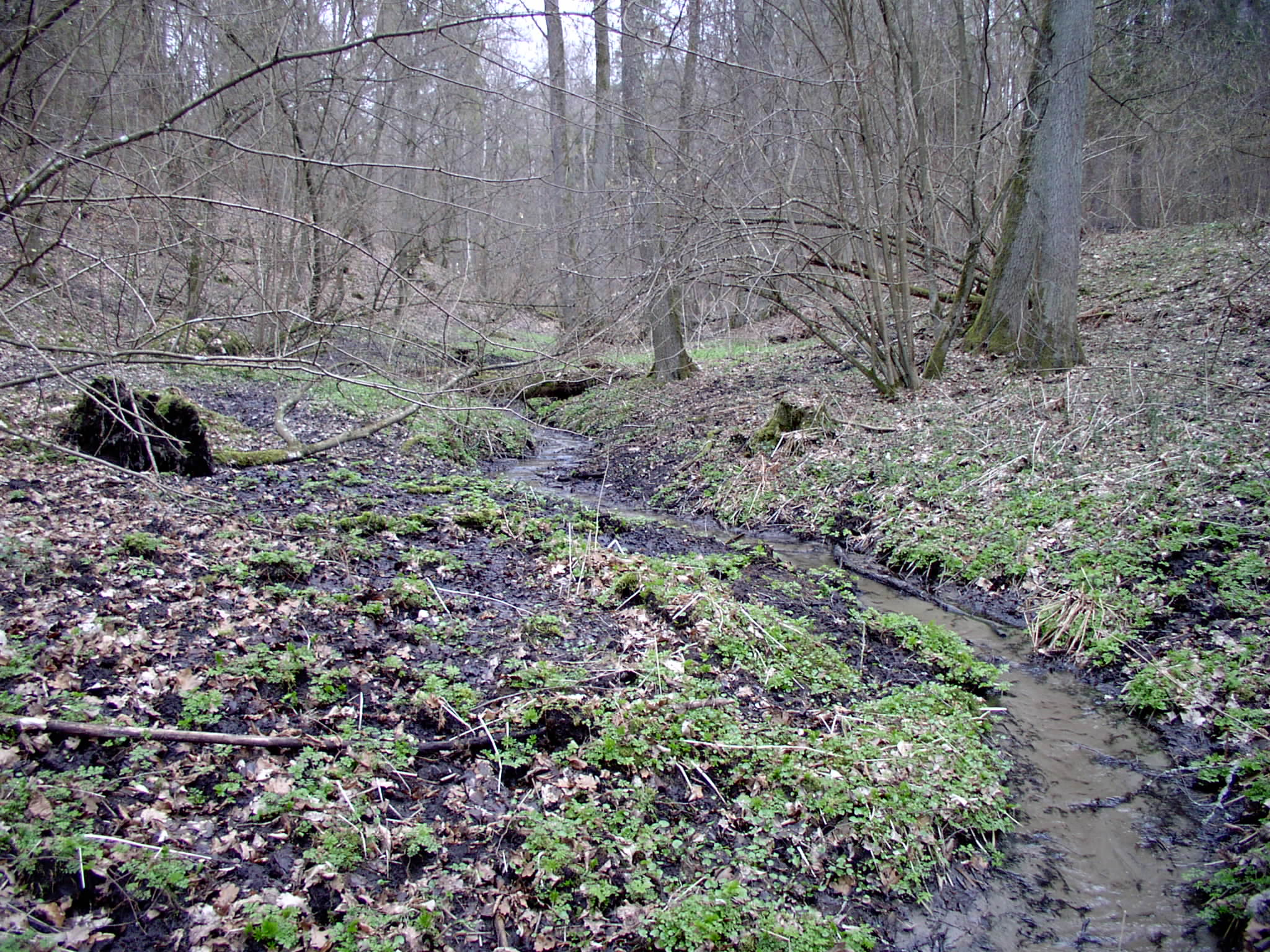 Śródleśny strumień, dolina Łyny, Smolajny